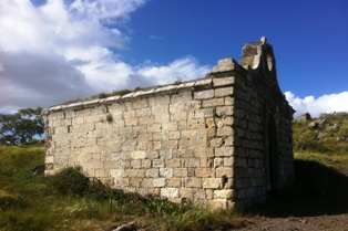 Chiesa di S. Croce (XV sec.). Prospetto Sud.